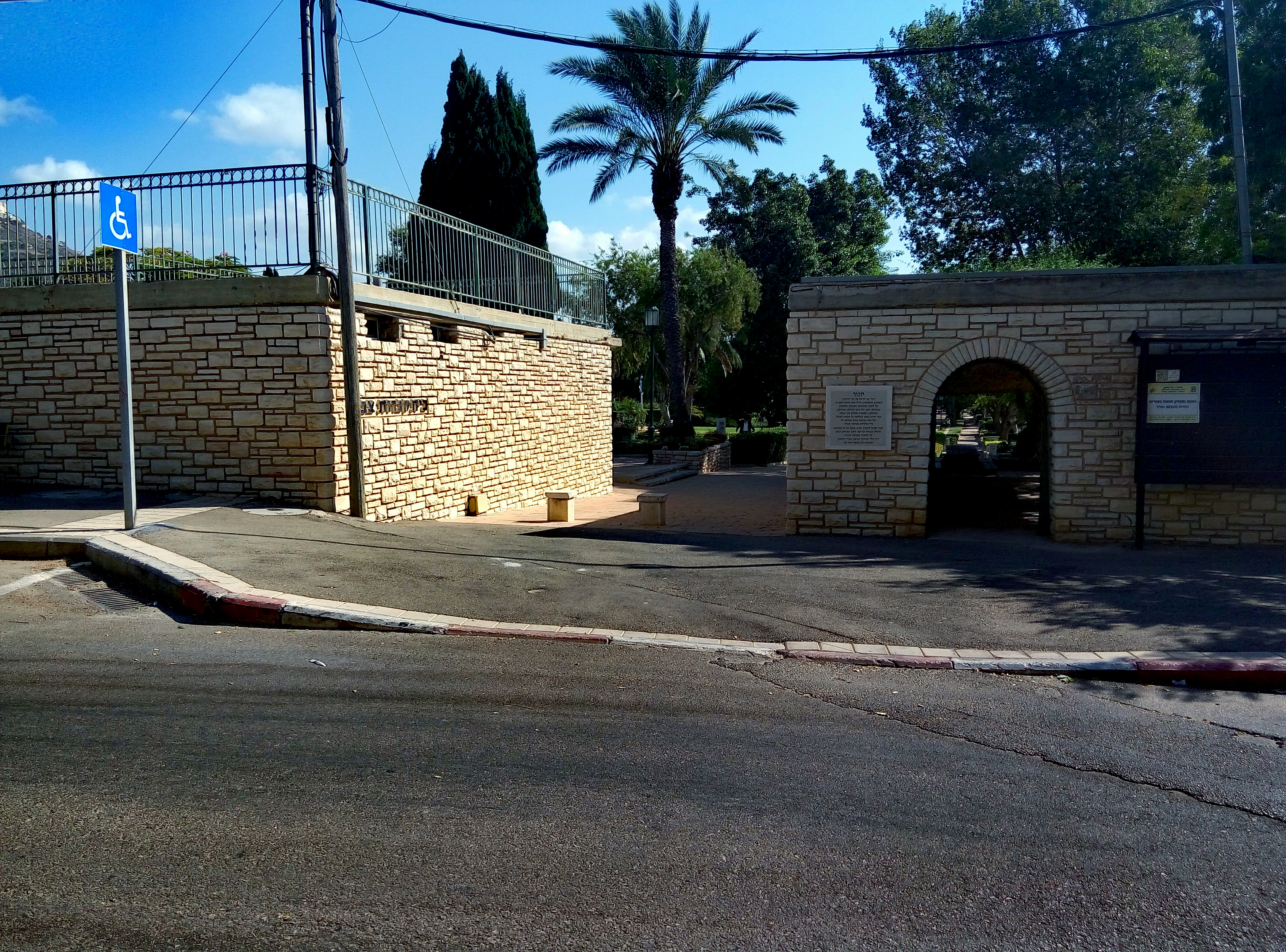 שכונת נווה דוד חיפה